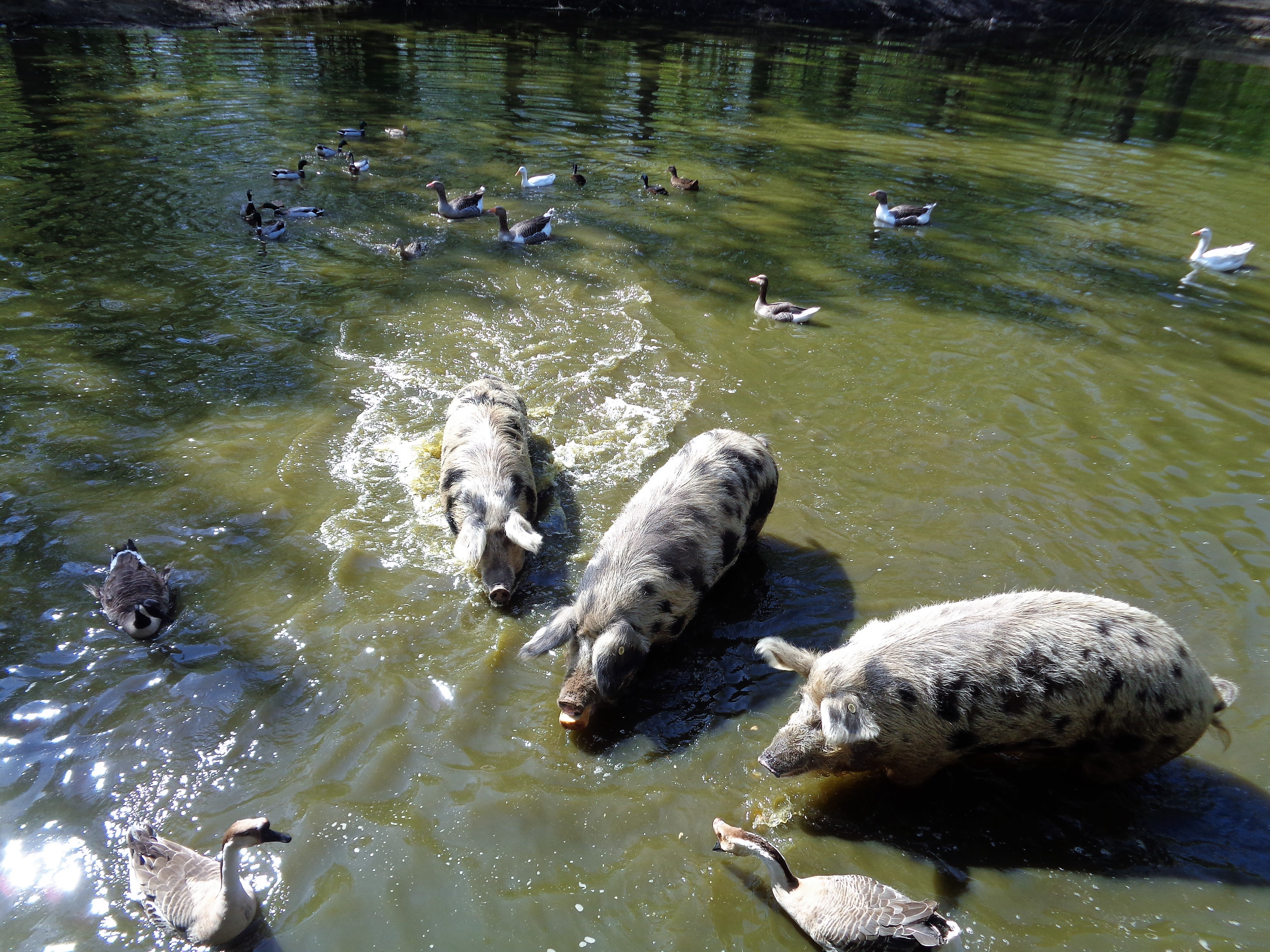 Die Turopolje-Schweine stammen aus den Save-Auen in Kroatien. Diese Tiere werden im schleswig-holsteinischen Tierpark Arche Warder gehalten.